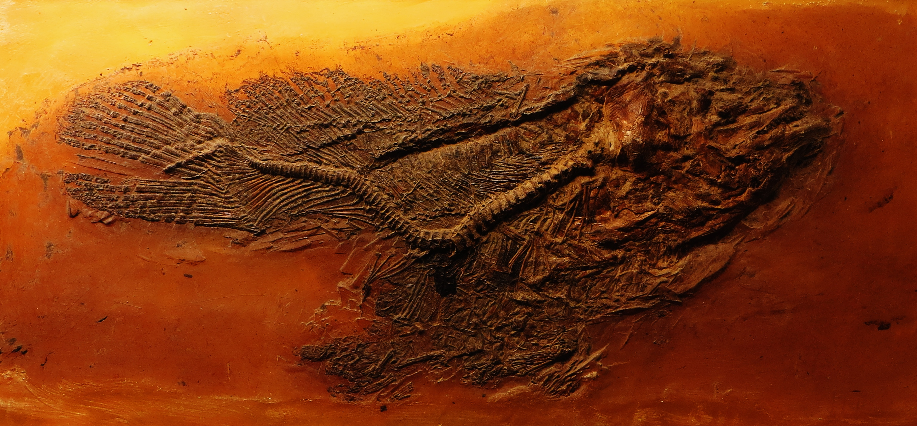 Fossil of Cyclurus, an extinct fish- Took the picture at Museum of Paleontology, Tuebingen